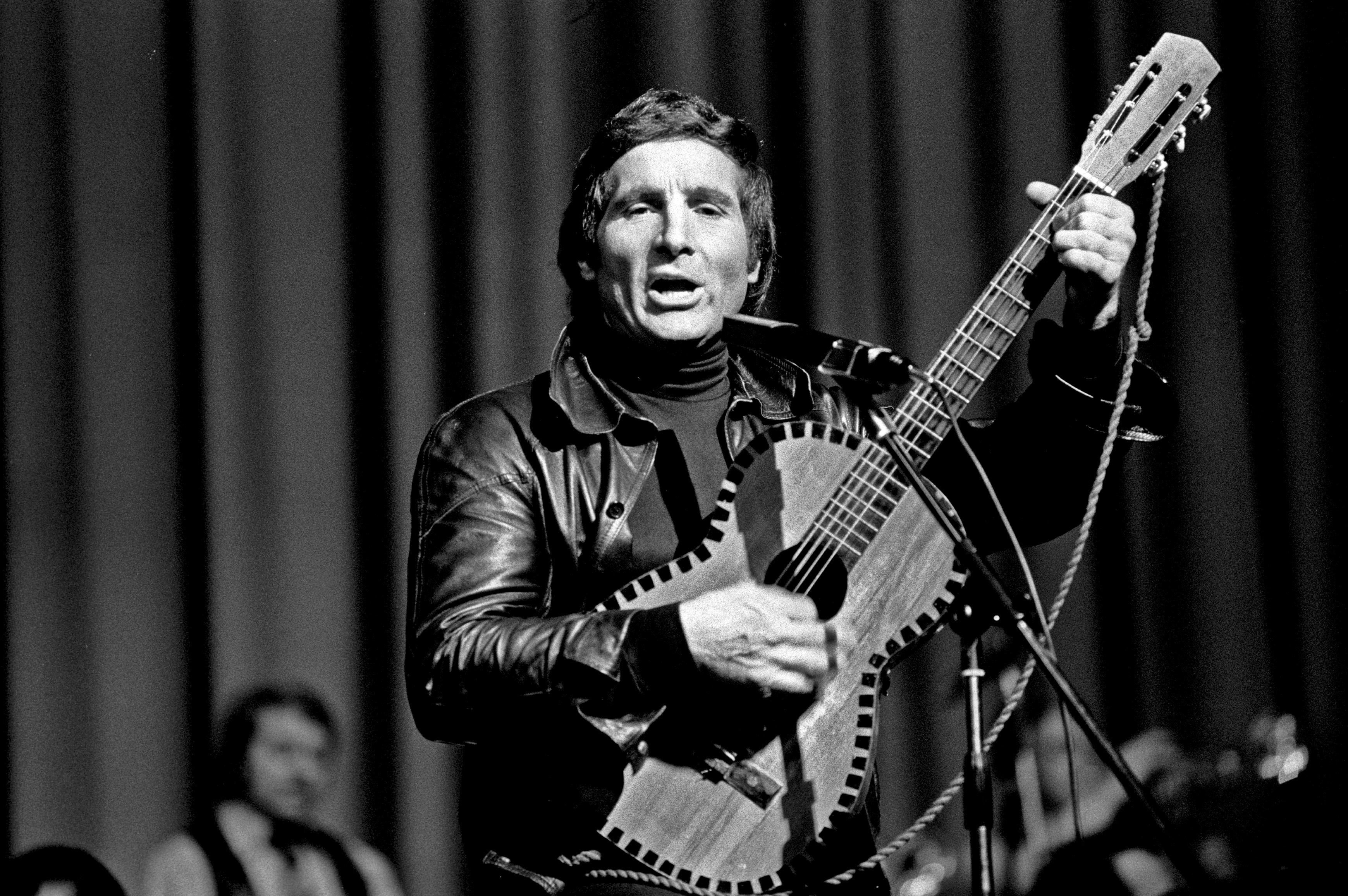 Schlagerstar Freddy Quinn in der Musikhalle Hamburg, 1971. Alter Mann? Er hat sich sogar aufs Hochseil getraut... Mehr Rock-Pop-Archiv auf